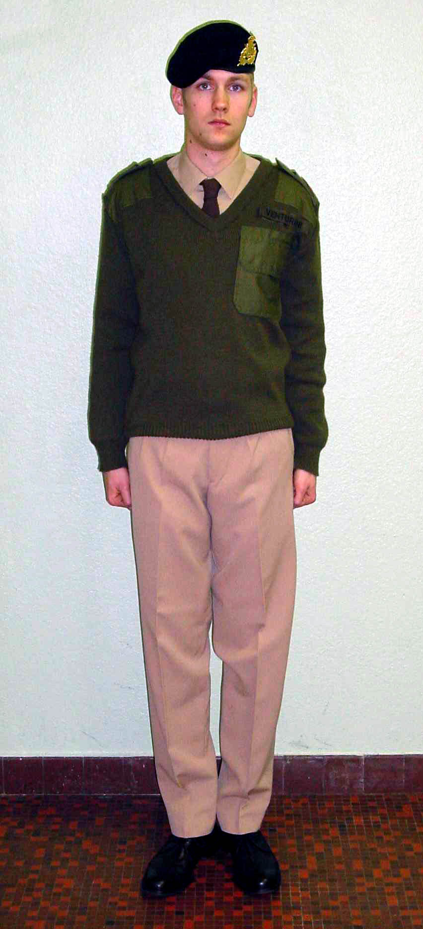 Lëtzebuerger Arméi Uniform Tenue S3E mat Pullover